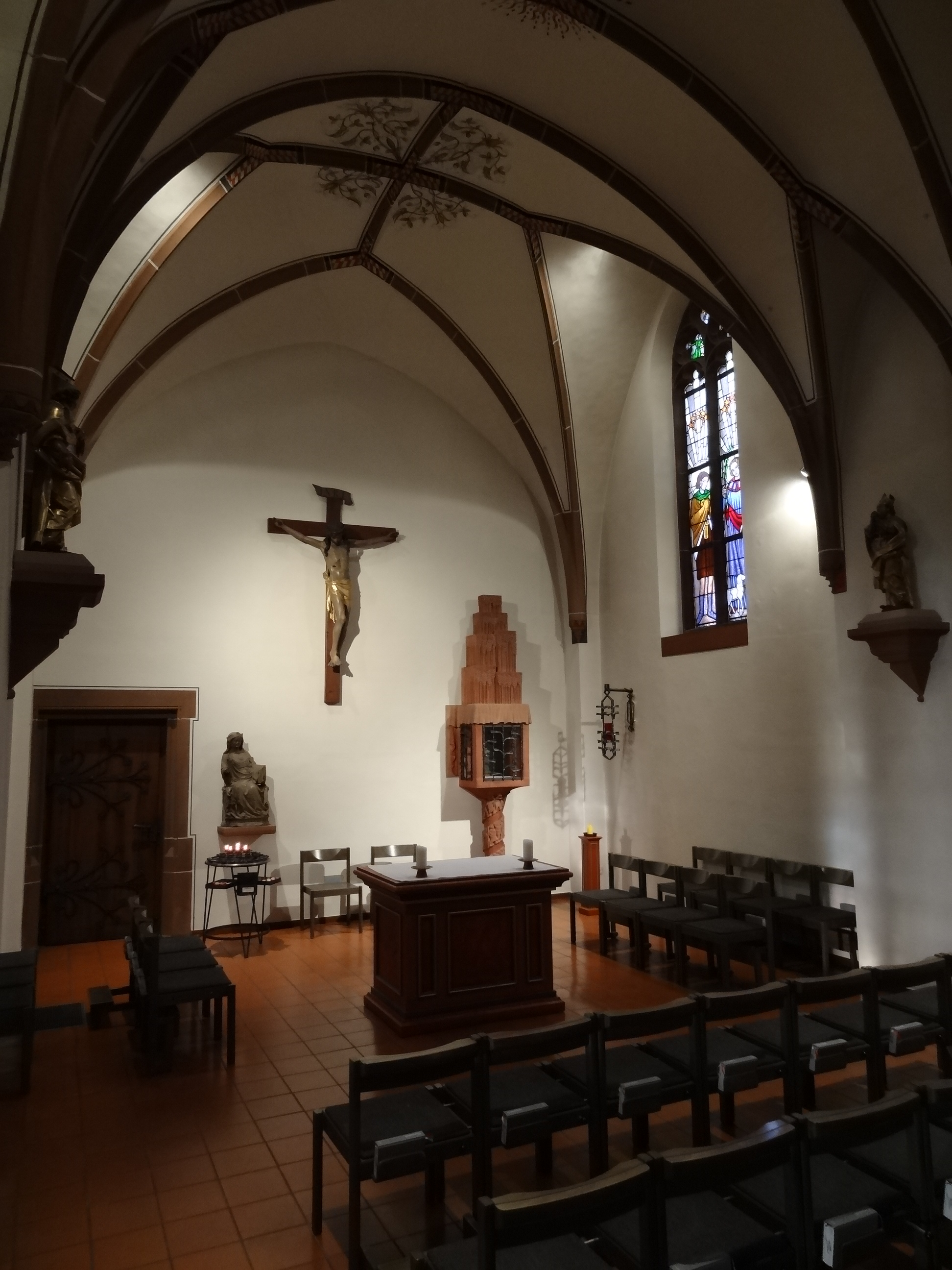 St. Bonifatius (Gießen)